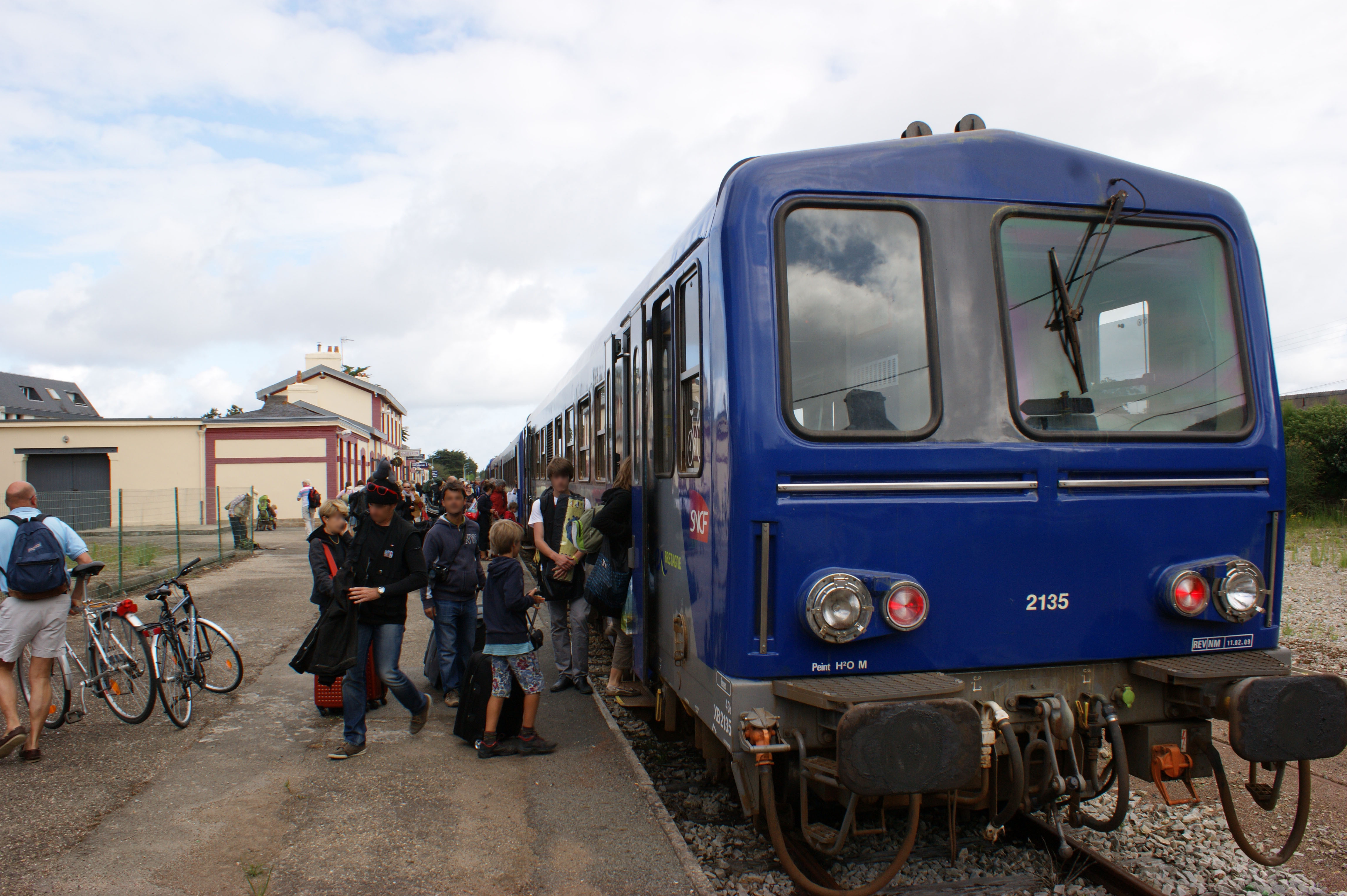 Le Tirebouchon à quai après son arrivée en gare de Quiberon en 2011.